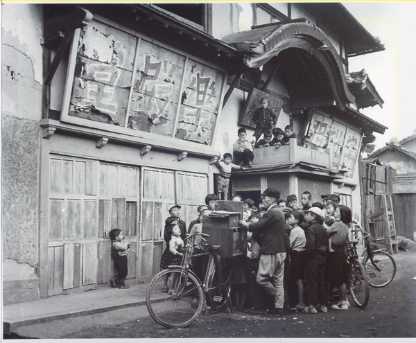 滋賀県草津市の大正座、戦後復興前1950年前後の写真。